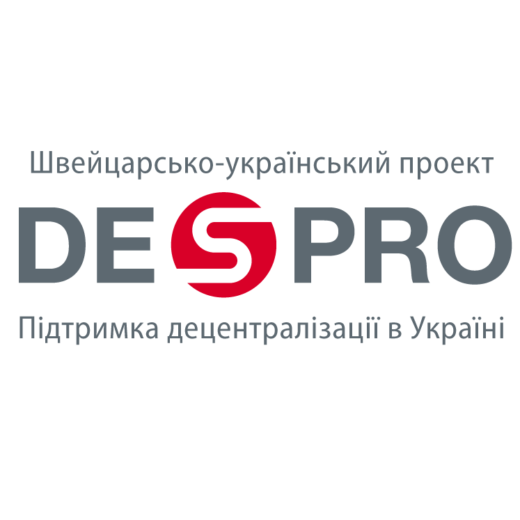 офіційний логотип проекту DESPRO